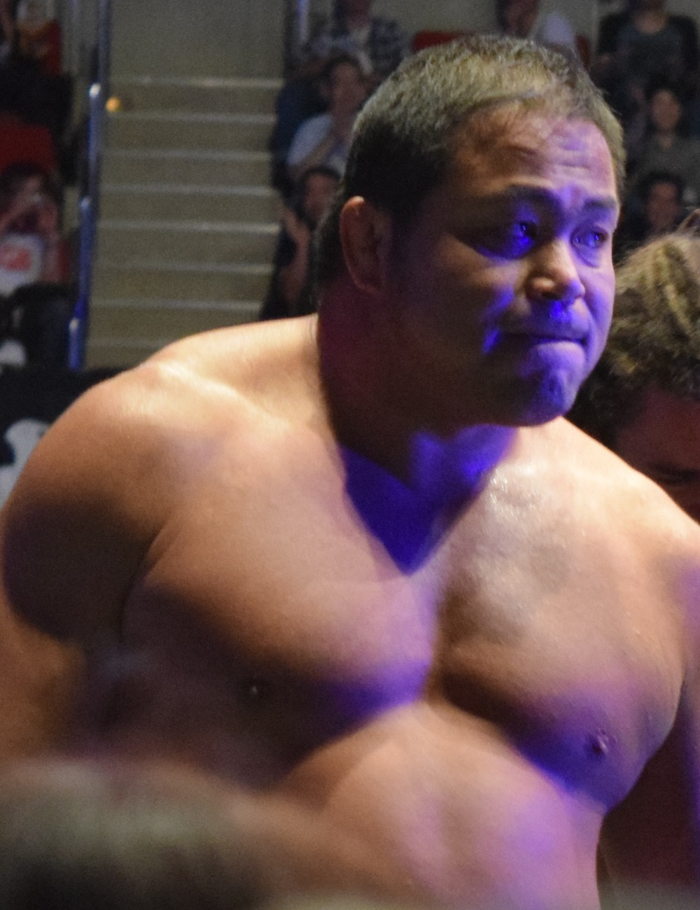 2015年9月27日 ワールド記念ホール「DESTRUCTION in KOBE」 中西学